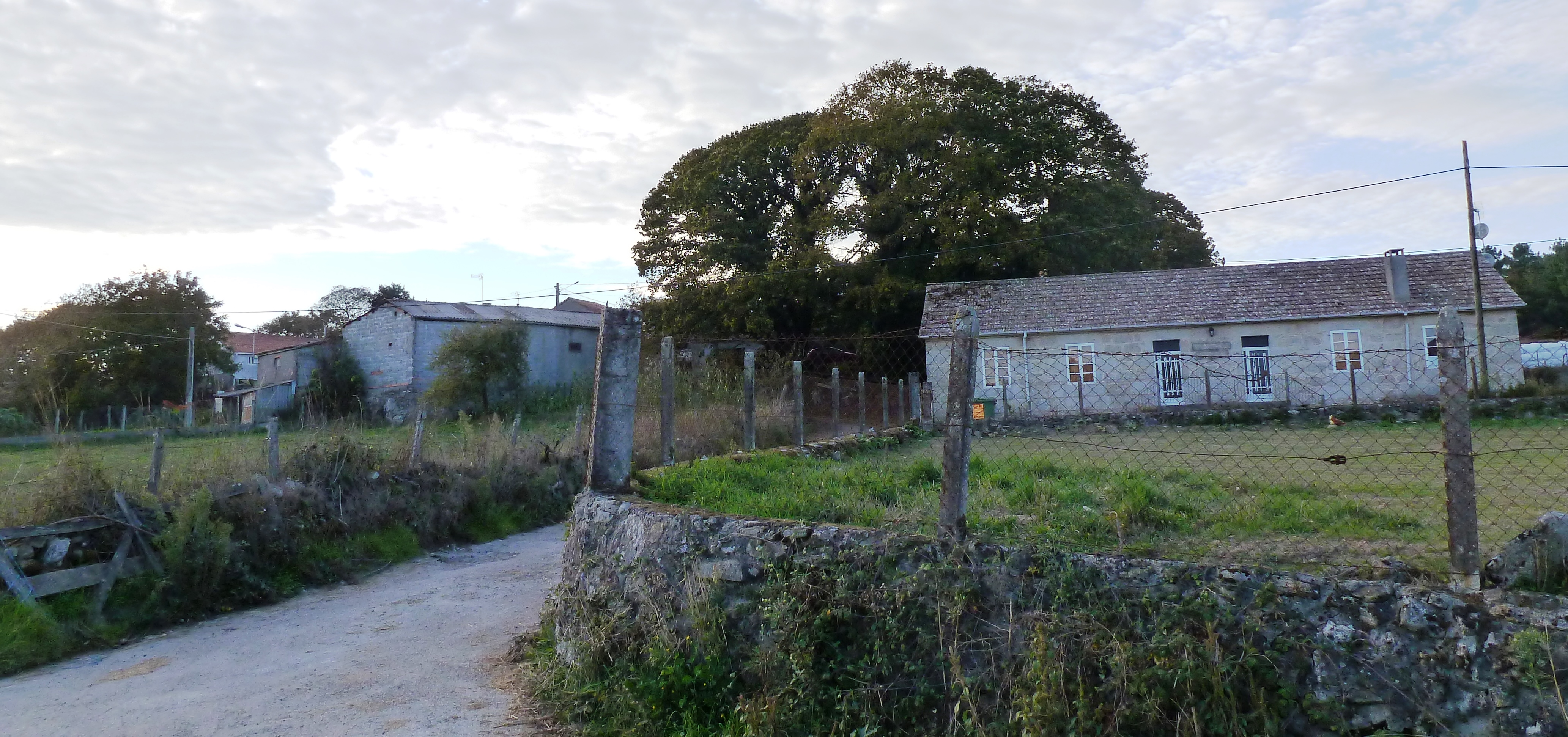 A Torre, Buciños, Carballedo